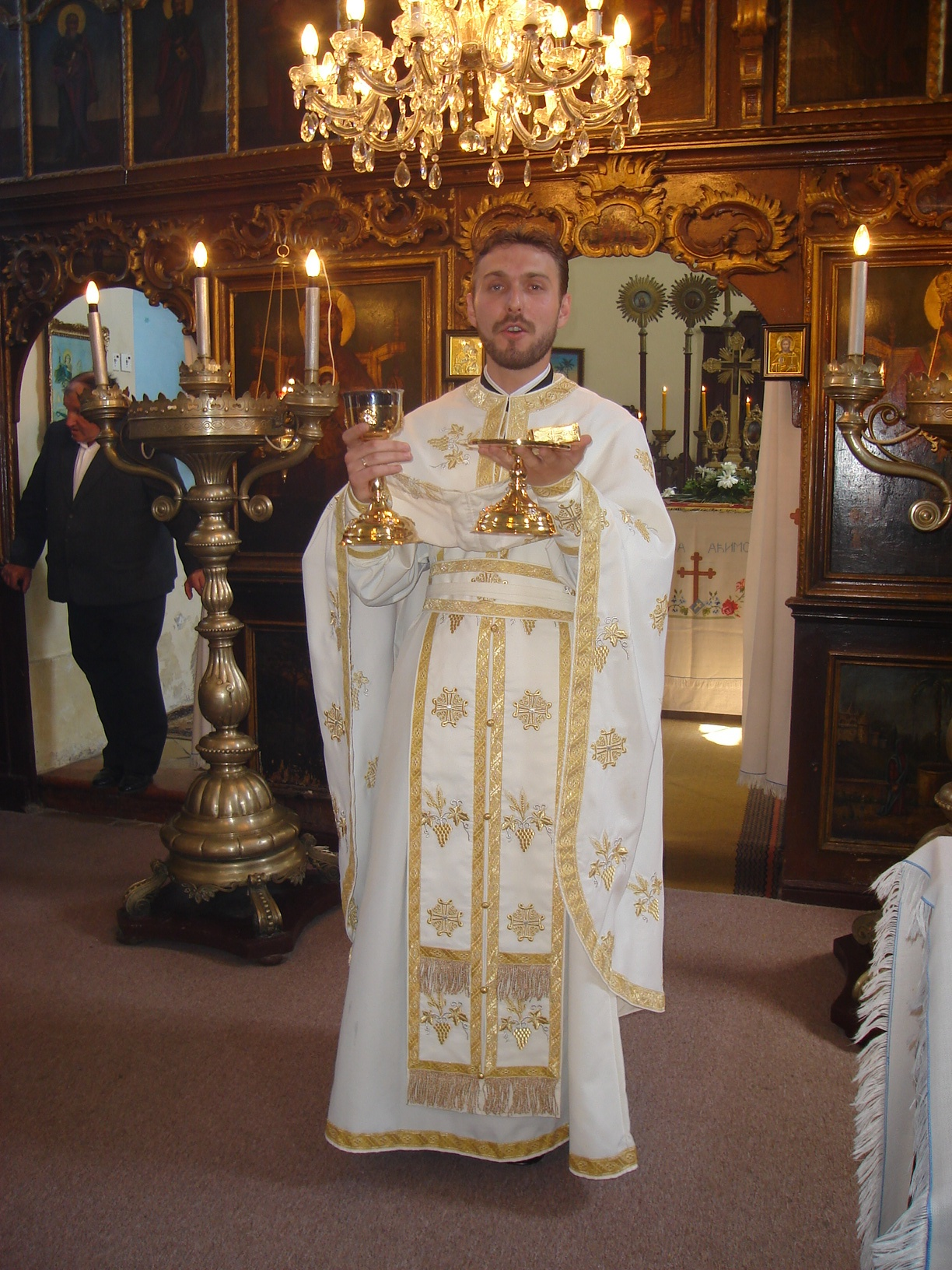 Jerej Slobodan Poznanović, paroh u Kneževim Vinogradima, prije nego što ga je episkop osječkopoljski i baranjski gospodin Lukijan odlikovao dostojanstvom protonamjesnika 4. XII. 2009. godine